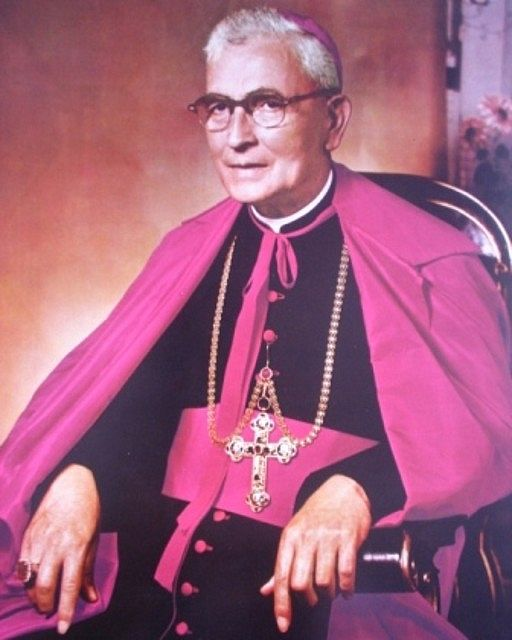 Archbishop Mariano Rossell y Arellano (1939-1964).